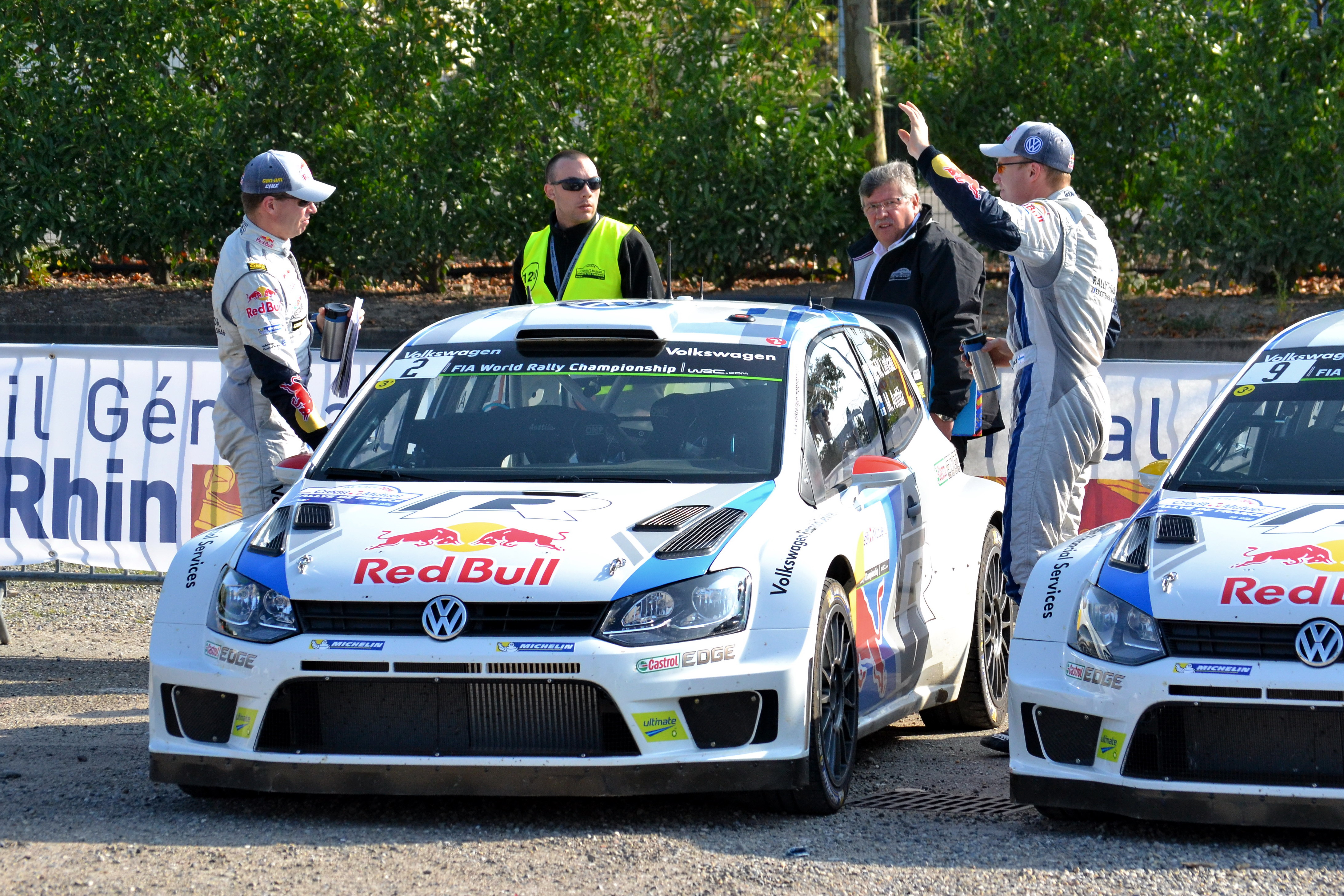 Jari-Matti Latvala et Miikka Anttila au parc d'assistance de Colmar durant le Rallye de France-Alsace 2014.